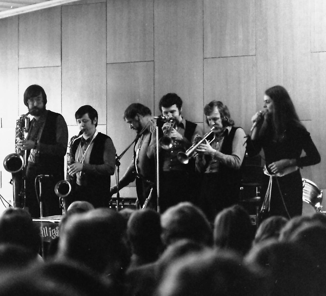 Poporkestern Yngves på 1970-talet i Skellefteå, troligen Balderskolans aula. Fr v Per-Olof "P-O" Johansson, Sten-Olov Granberg, Yngve Forssell, Paul "Palle" Lindberg, Philip Minton, Anki Hedmark. Ej i bild: Elizabeth "Liz" Lundberg, Svante Bergman och Tommy Forssell.